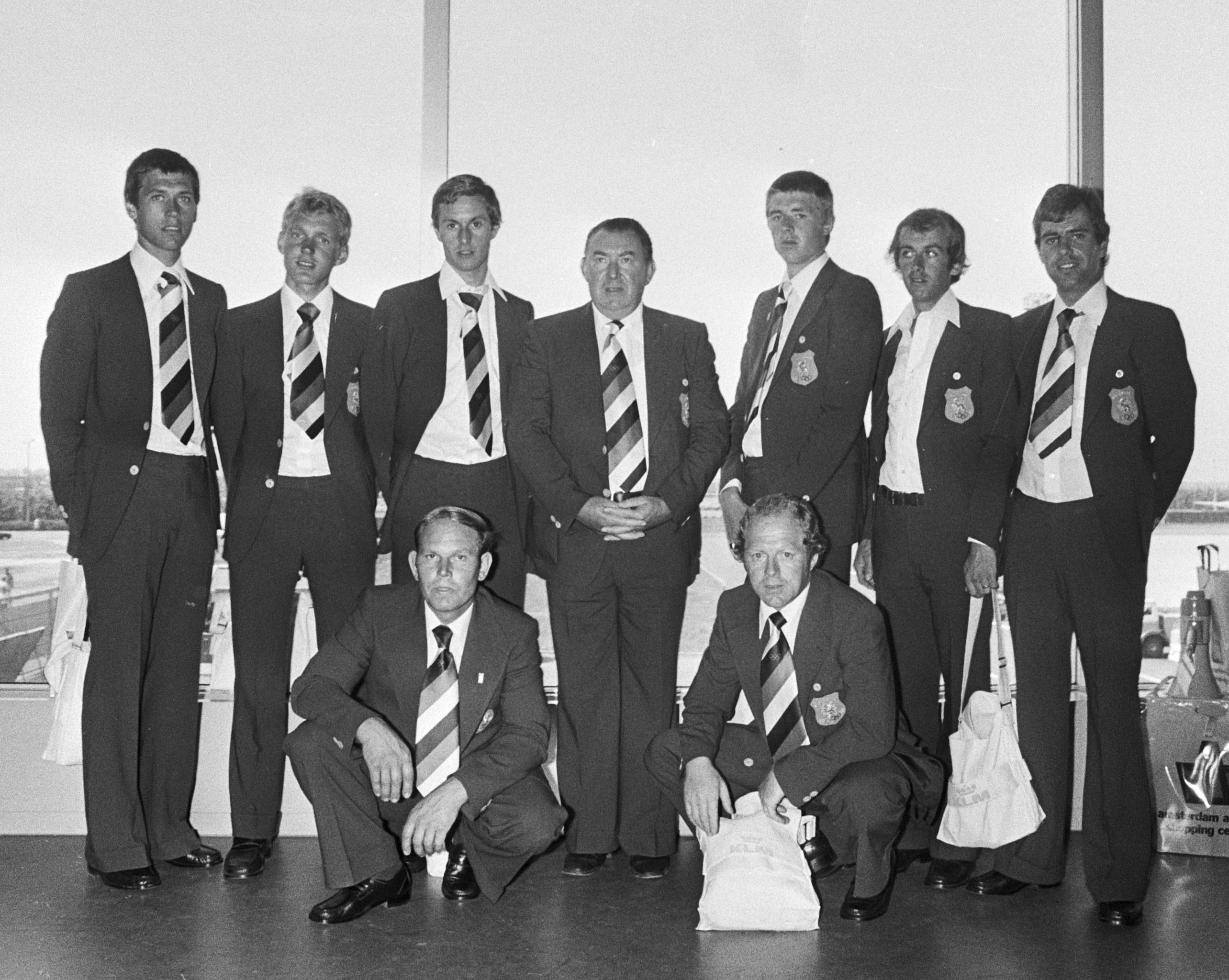 Olympische wielerploeg op weg van Schiphol naar Montreal; Van Houwelingen, Van Katwijk, H. Pisard, V.d. Bunder, Ad Tak, Joop Middelink, J. v.d.Wal, soigneur J. Kuiper